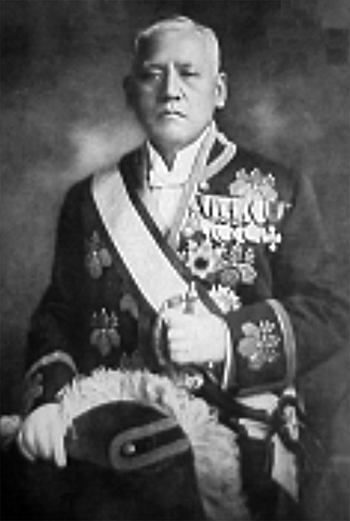 Kakichi Uchida (1866–1933)